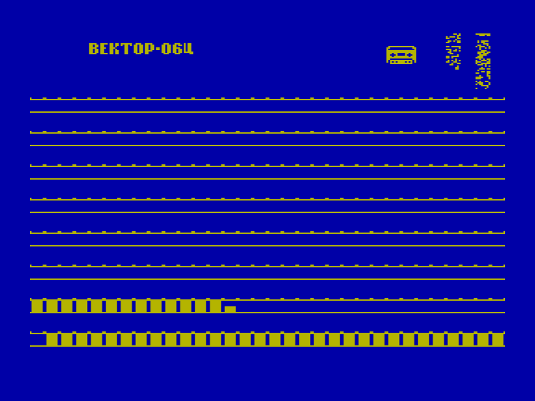 Типичный вид экрана "Вектора" во время загрузки с магнитофона (вариант с ПЗУ 2 Кб)